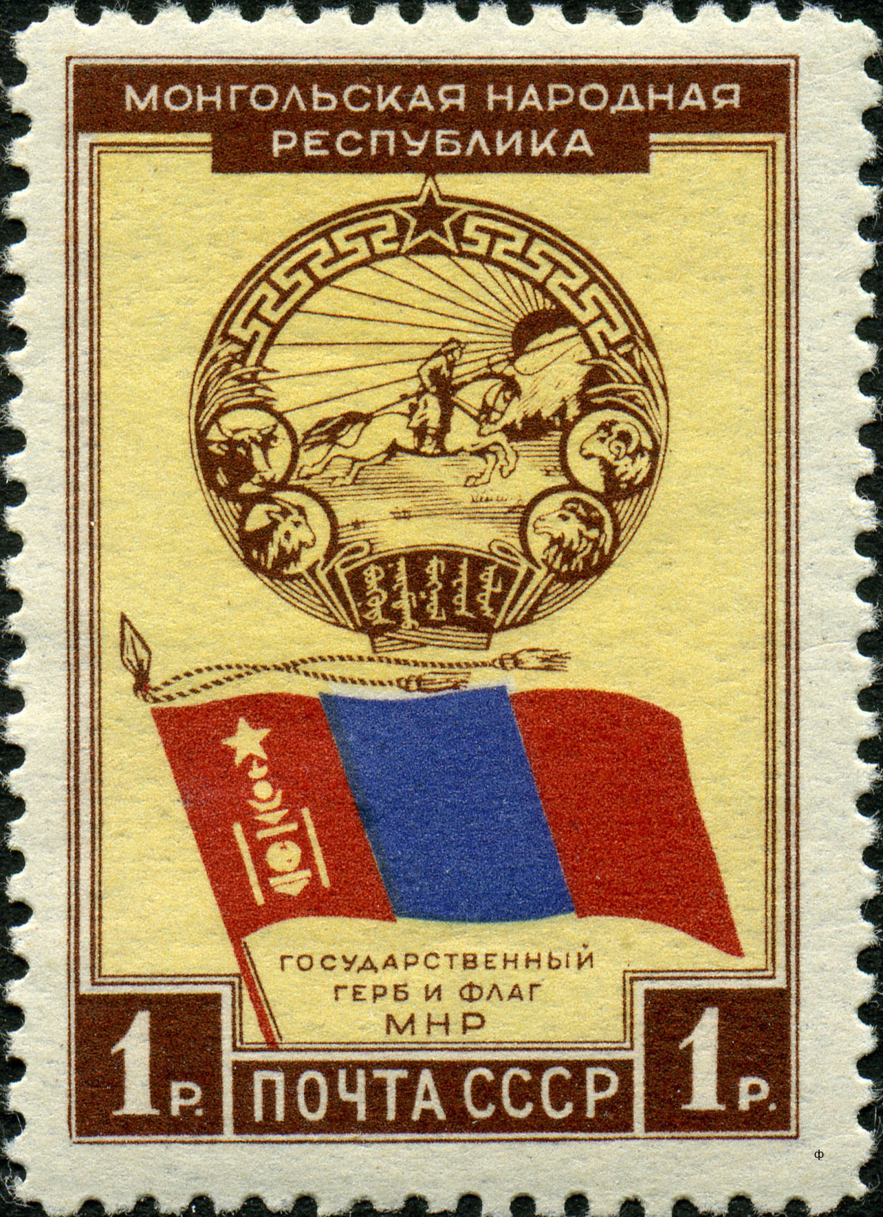 Марка СССР, посвящённая Монгольской Народной Республике, образованной в ноябре 1924. Выпущена в марте 1951 года. На марке изображены государственный герб и флаг республики. Художник — Е. Буланова. Номер по каталогу ЦФА — 1606. Тираж — 600 тыс. экз.